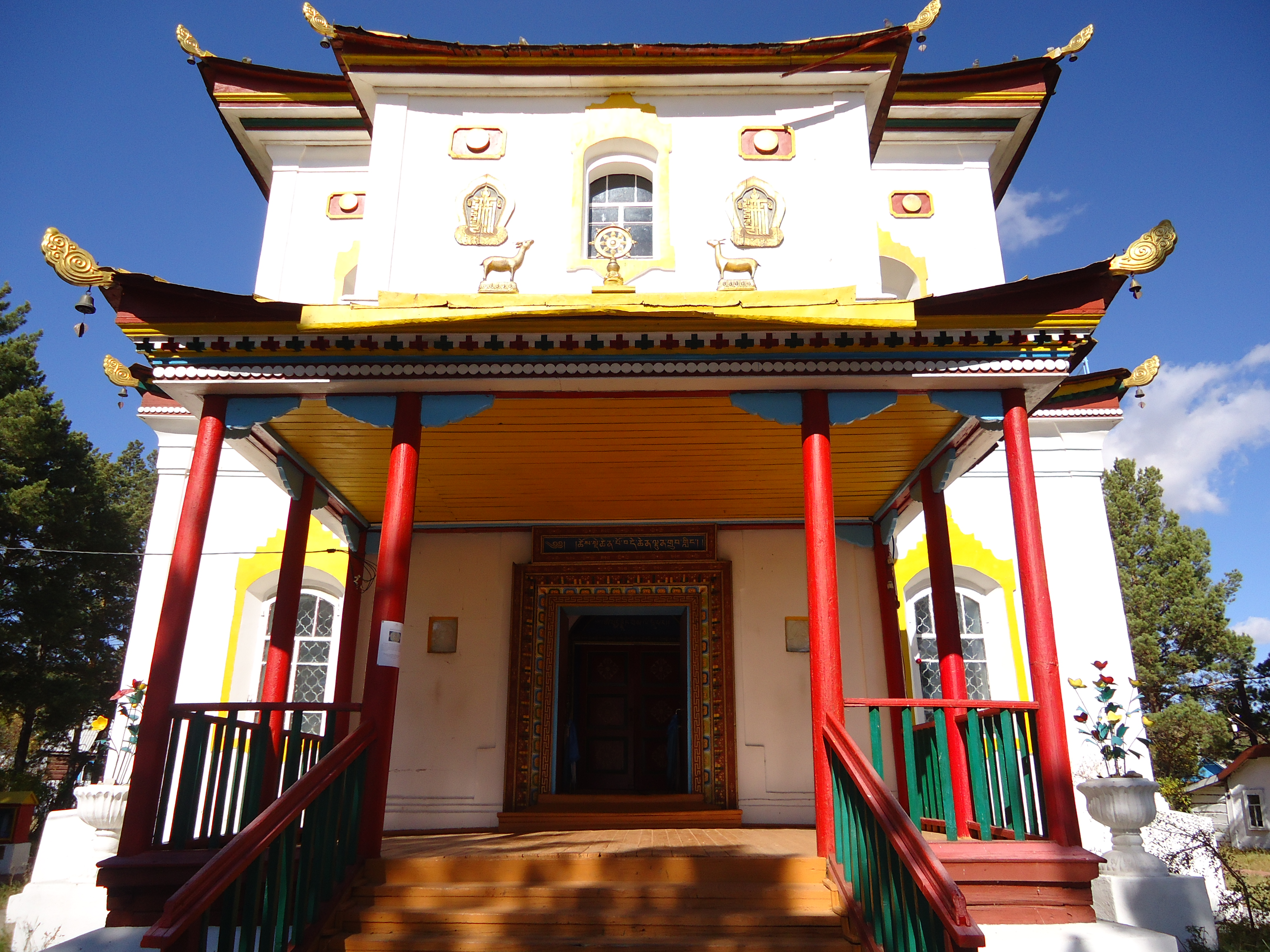 Буряад: Проводят хураалы. Верующие молляться.